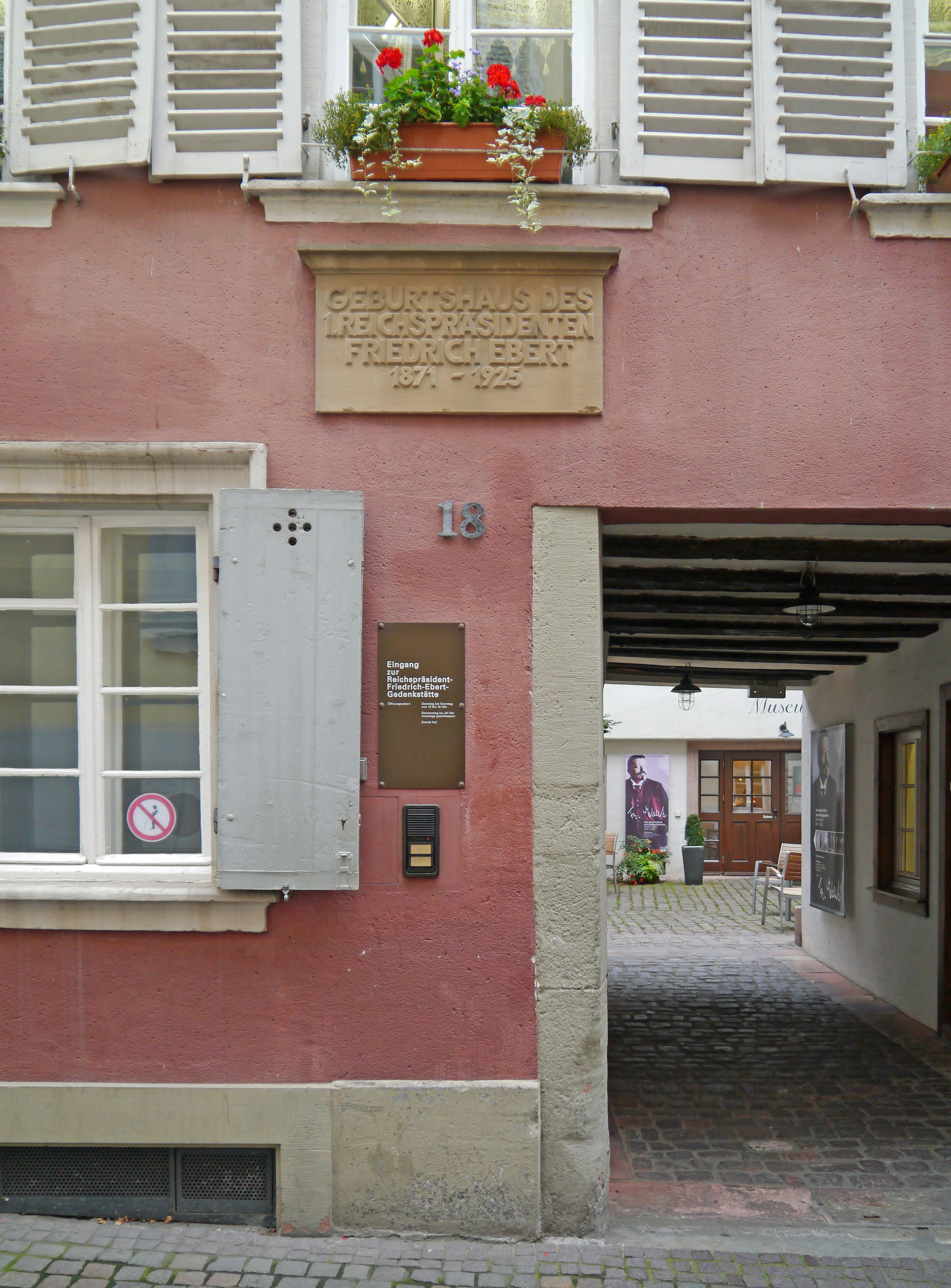 Stiftung Reichspräsident-Friedrich-Ebert-Gedenkstätte, 2012 in der Pfaffengasse 18 in Heidelberg.